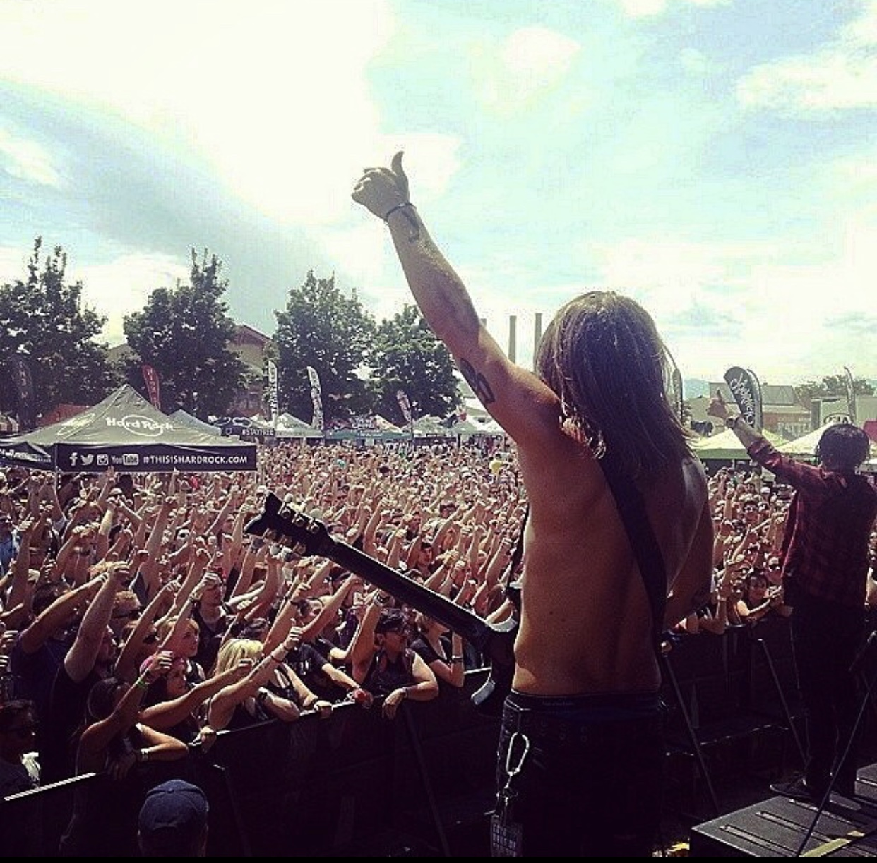 Asustarse actuando en Warped Tour en Utah, 2014